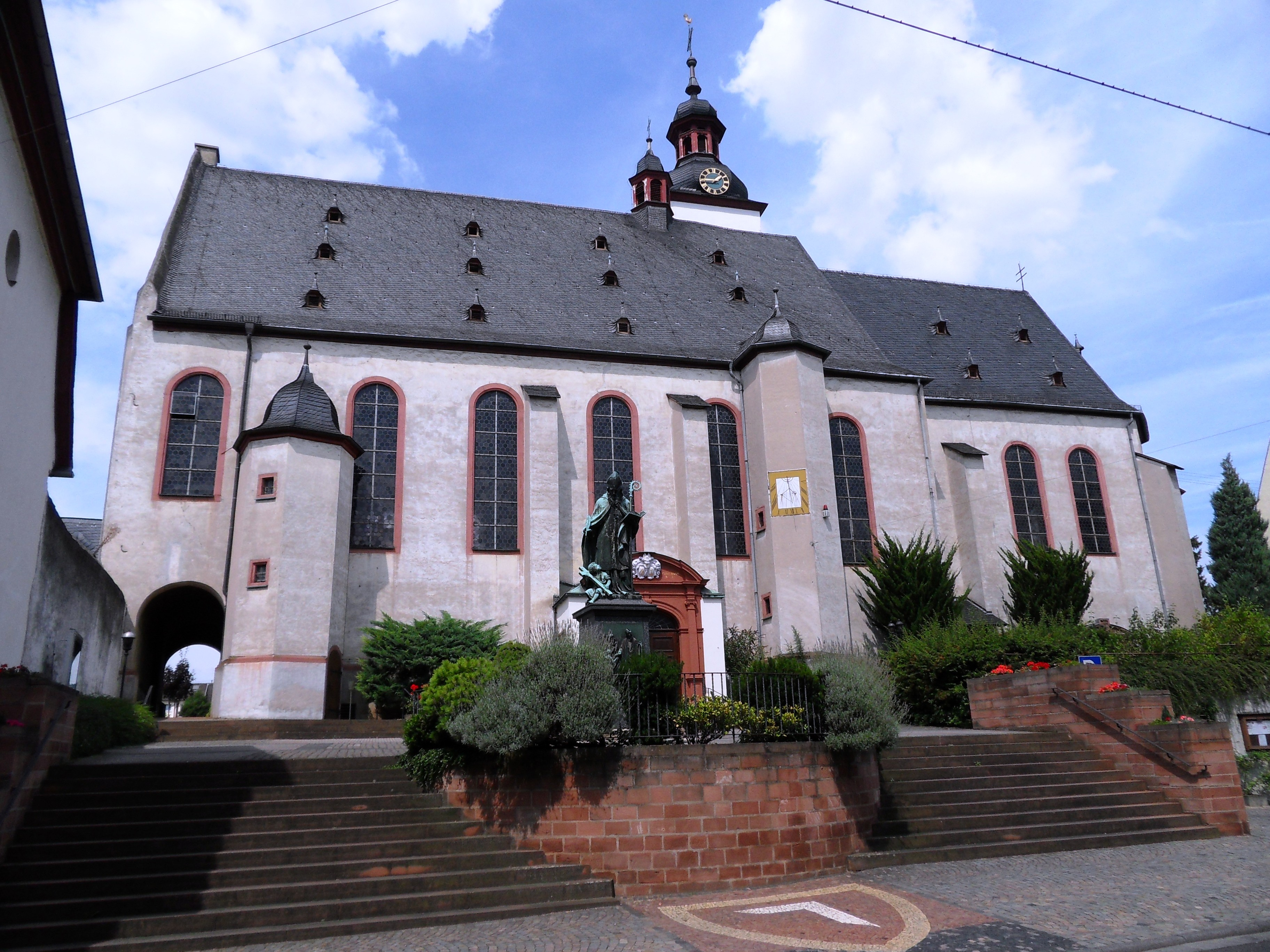 Katholische Pfarrkirche Sankt Walburga in Winkel im Rheingau von der Hauptstraße aus gesehen. Über den auf der Terrasse gelegenen Kirchvorplatz verläuft diagonal der 50. Breitengrad nach dem traditionellen Potsdam-Datum. Vor der Terrasse die Statue von Rabanus Maurus, der auch in Winkel gelebt hat. Darunter ist als Pflastermosaik das Wappen der früheren Gemeinde Winkel zu sehen.